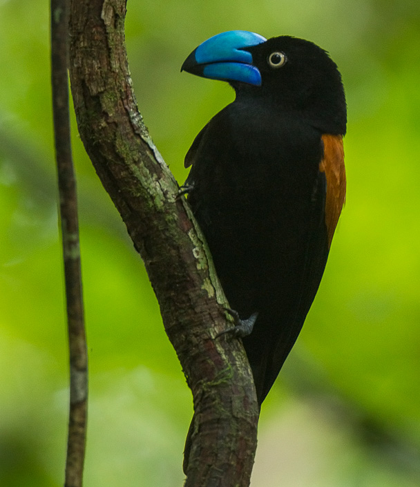 Helmet Vanga - Masoala - Madagascar_S4E7366